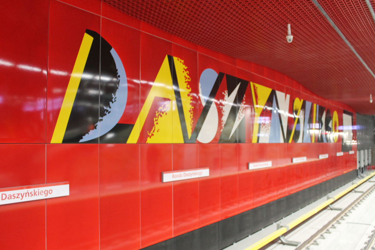 Ściana zatorowa na stacji C9 Rondo Daszyńskiego. - Opracowanie graficzne Wojciech Fangor